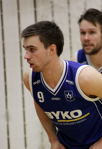 Dagur Kár Jónsson (9) and Ágúst Angantýsson of Stjarnan in a Úrvalsdeild karla game against Grindavík on 22 January 2015.